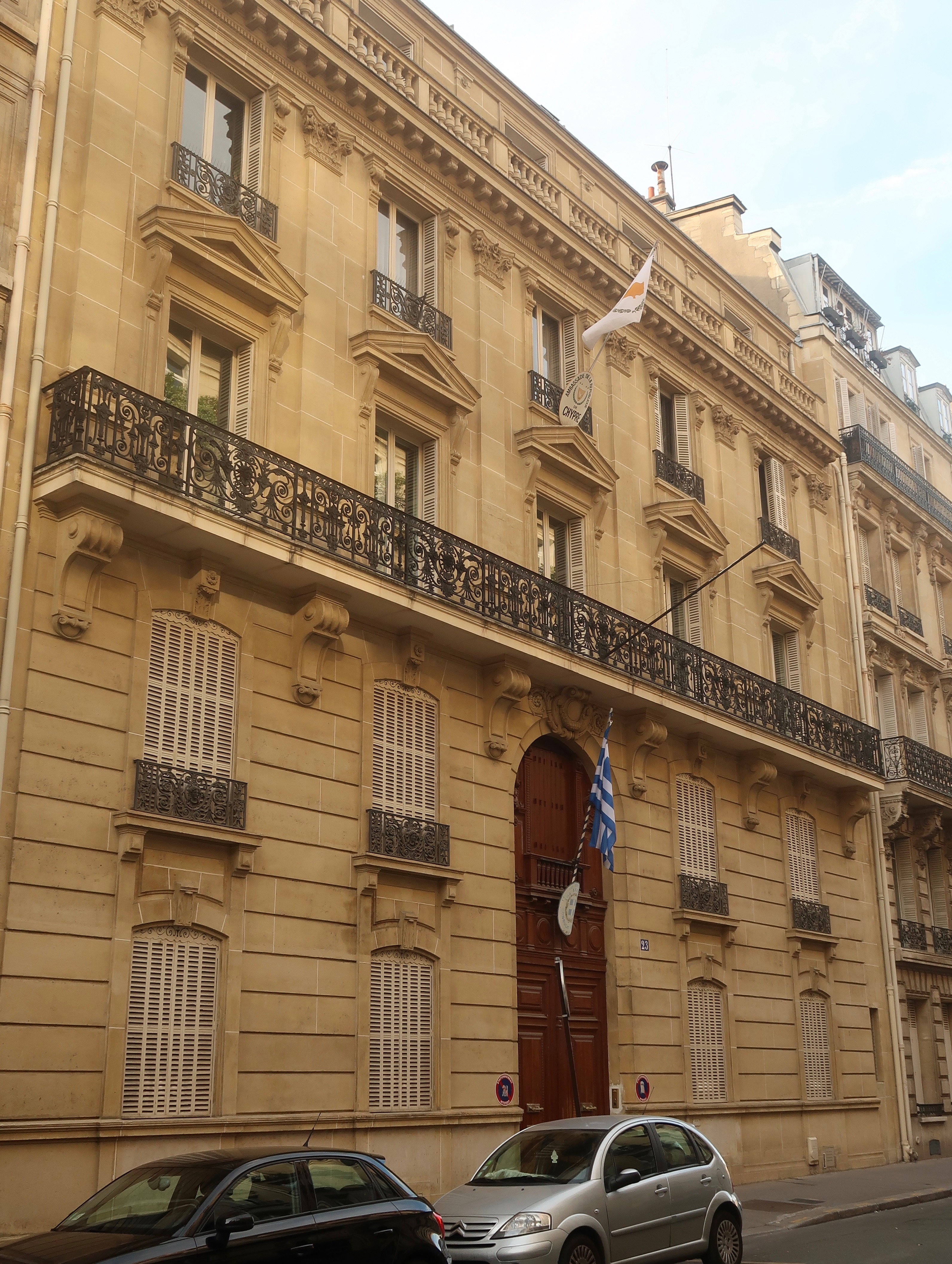 Ambassade de Chypre en France et consulat général de Grèce, n°23 rue Galilée (Paris, 16e).